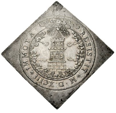 ÖSTERREICH, Salzburg. Wolf Dietrich von Raitenau. Erzbischof, 1587-1612. AR Turmtaler Klippe